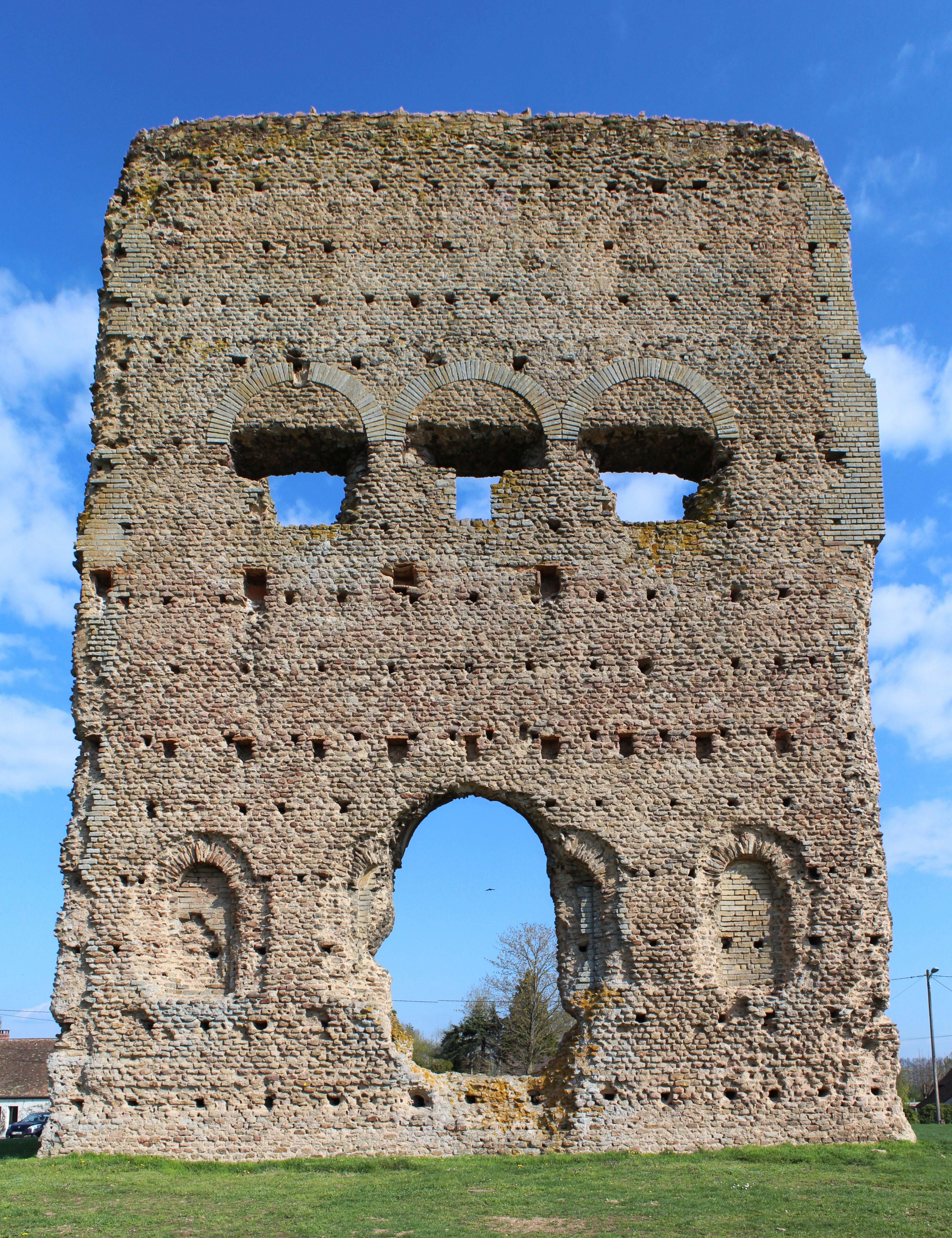 Temple de Janus, Autun.